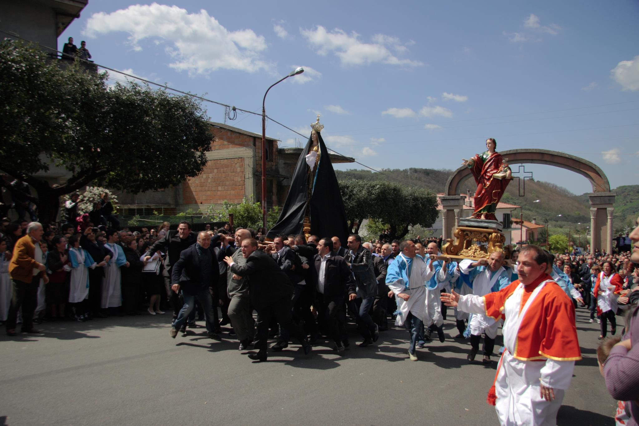 Maria SS della Consolazione e San Giovanni Evangelista corrono verso Il Cristo Risorto